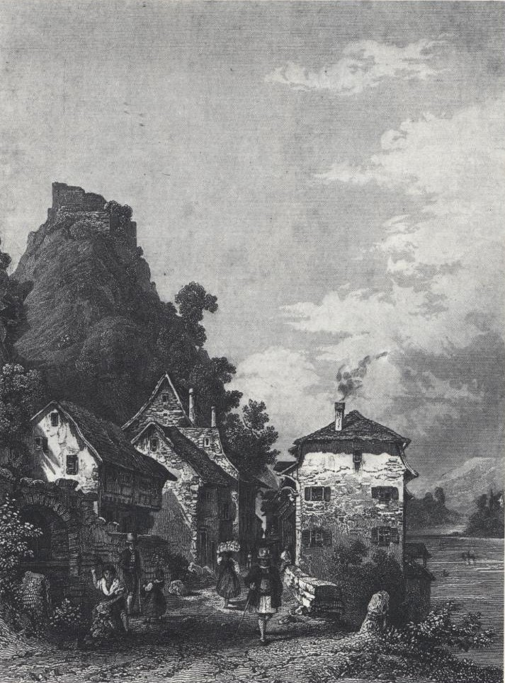 Burg und Städtchen Hauenstein